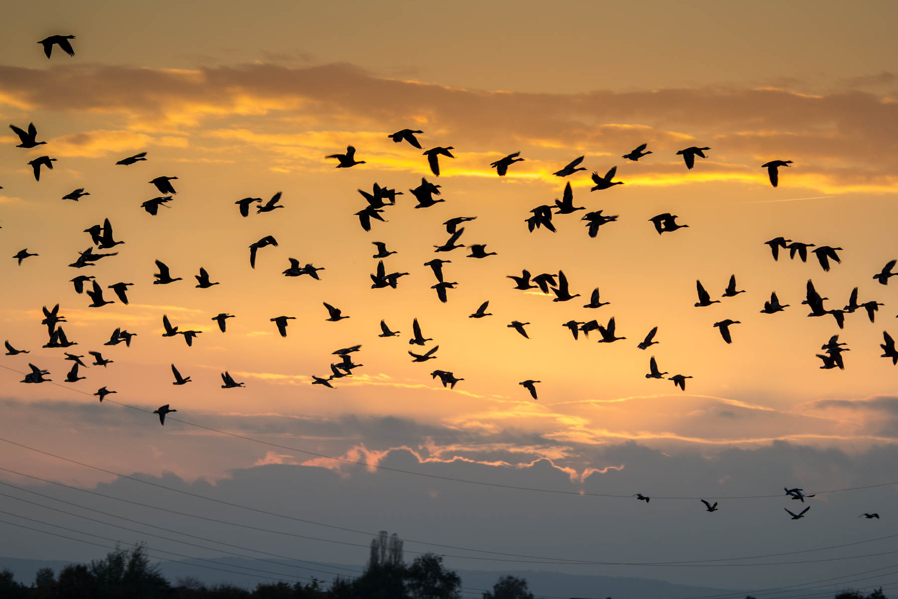 Das Naturschutzgebiet Alte Leine ist ein beliebter Rastplatz für Zugvögel.